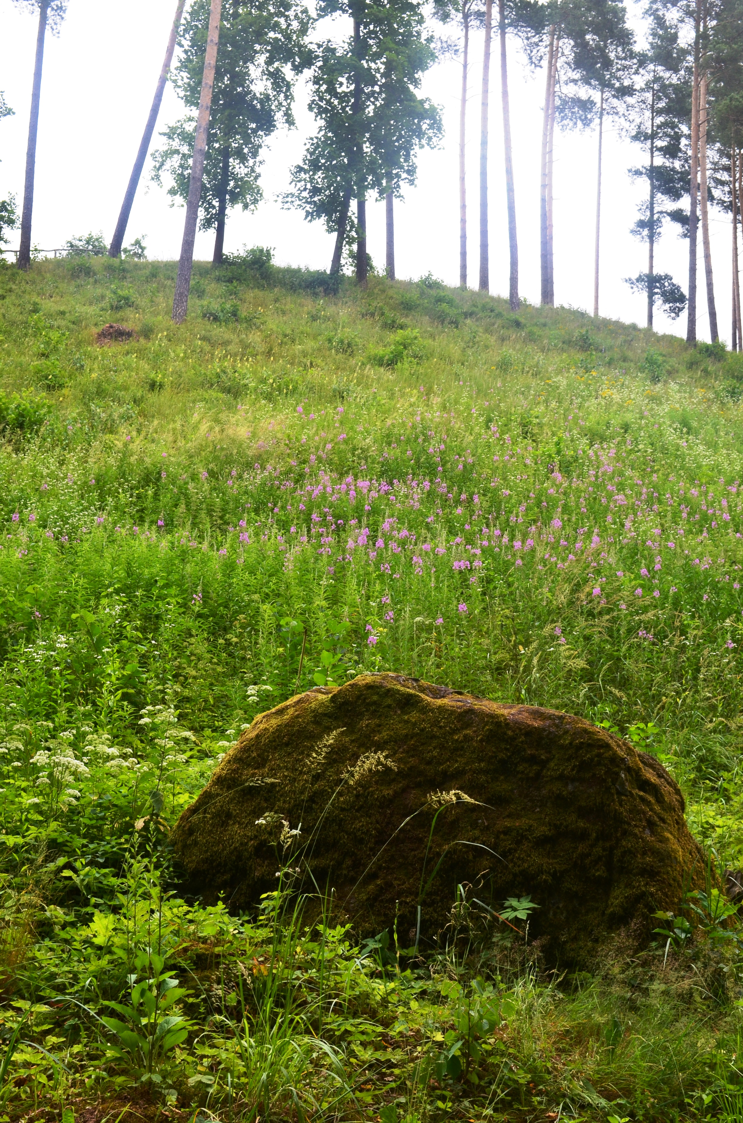 Stirnių piliakalnis nuo Saidės pusės, Trakų raj.